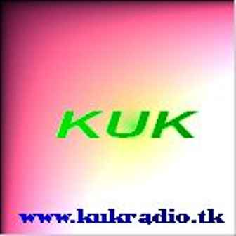 Kuklogo